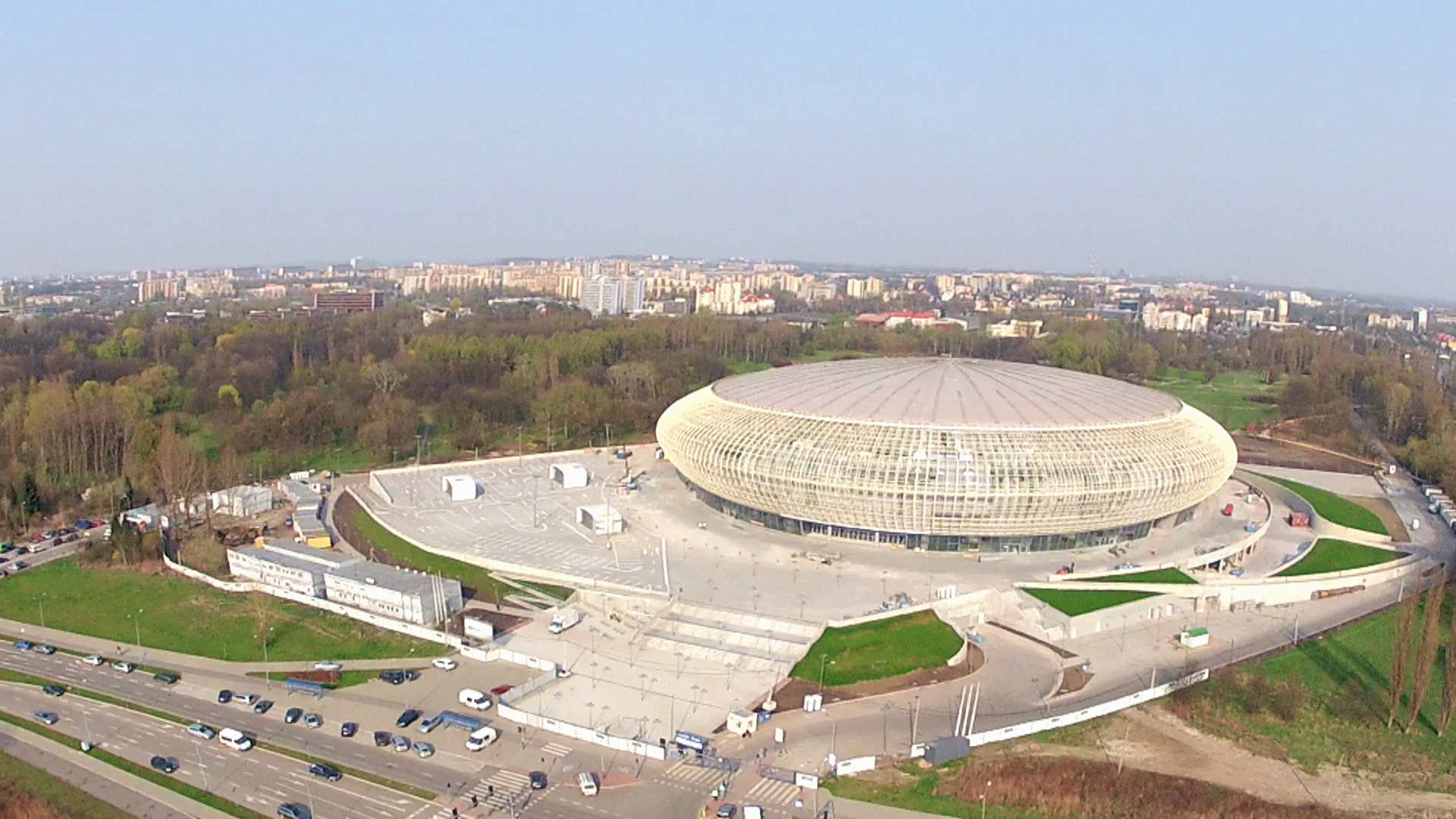 Kraków Arena z lotu ptaka